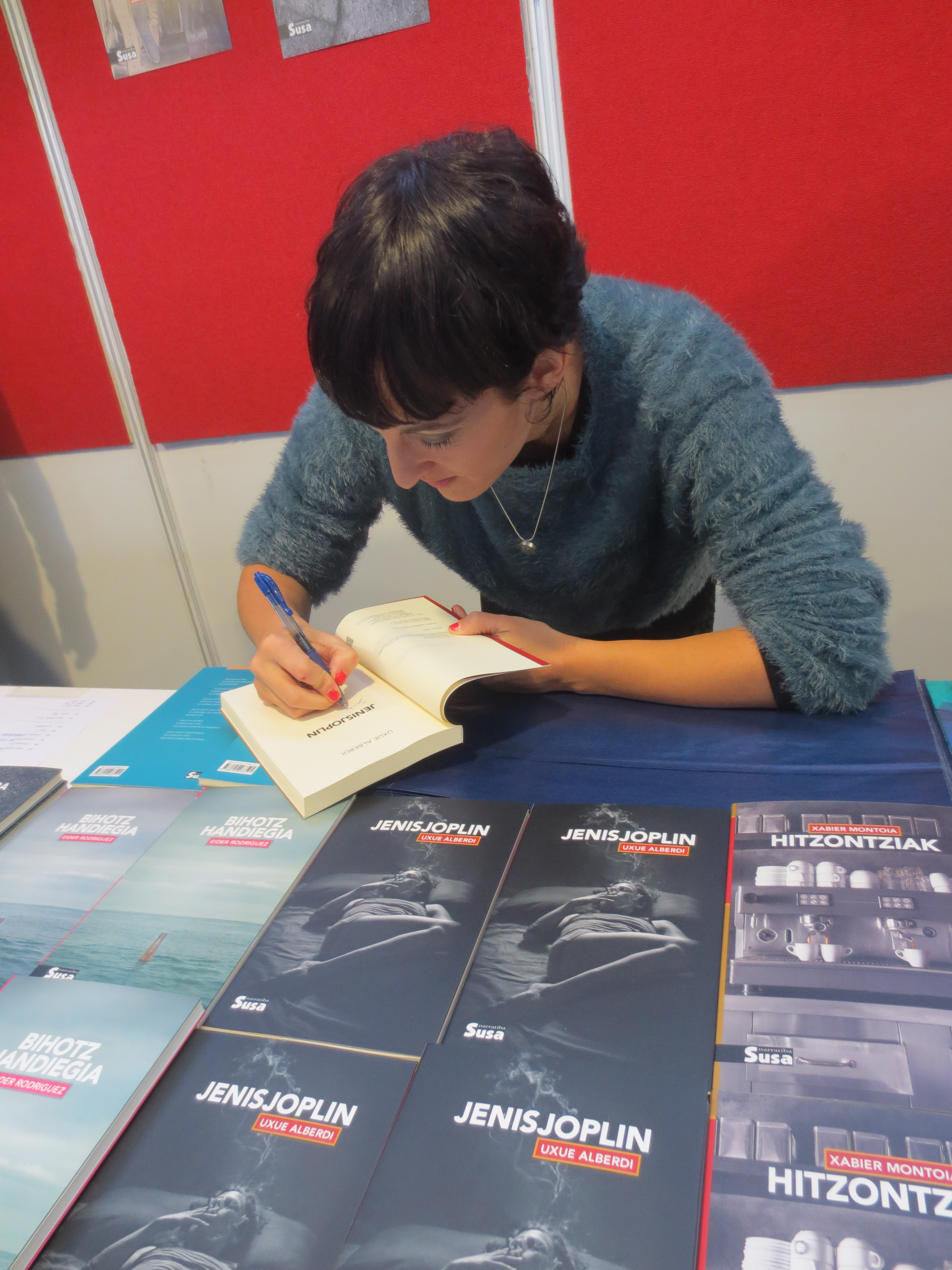 Uxue Alberdi Jenisjoplin ale bat sinatzen Durangoko azokan. 2017.